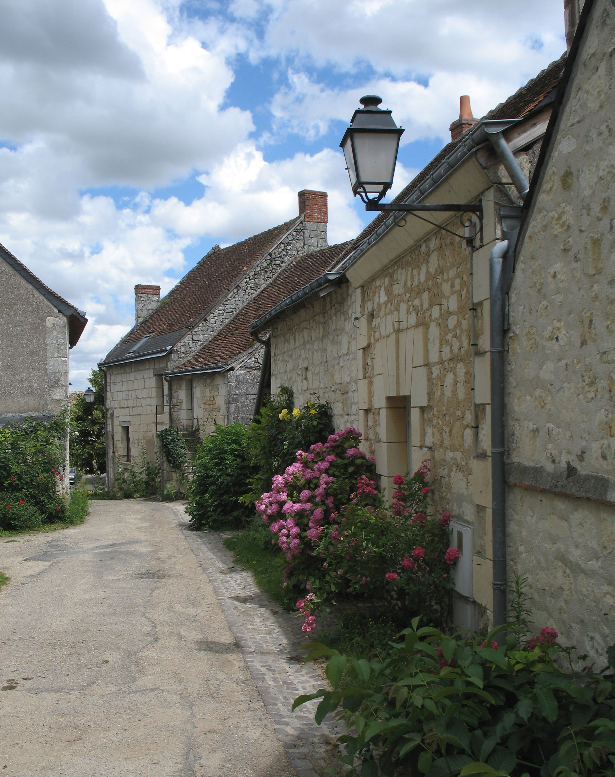 Ruelle à Crissay-sur-Manse, Indre-et-loire, France. Le village est classé parmi les plus beaux villages de France.